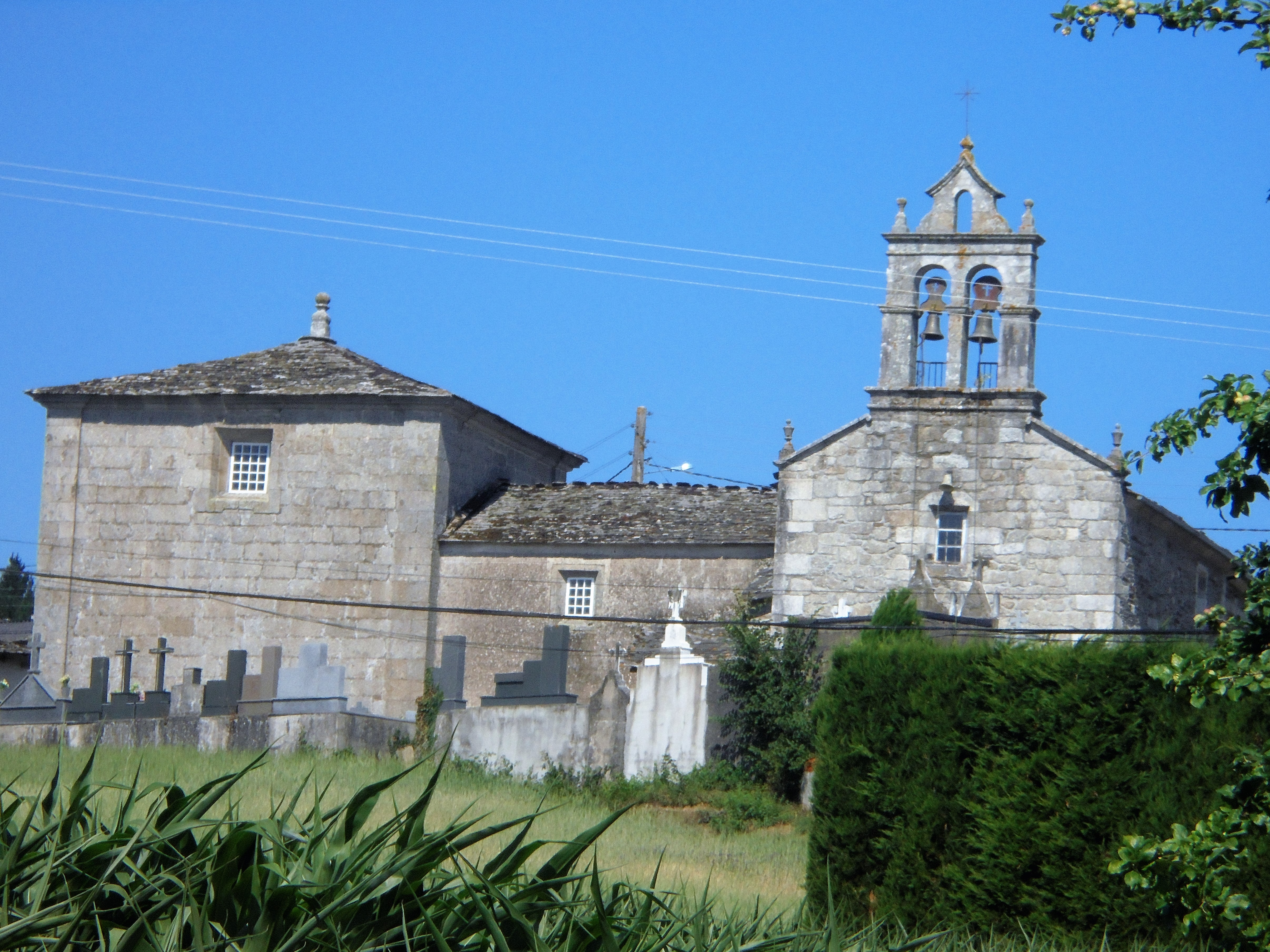 Igrexa parroquial de San Vicente de Coeo ( Lugo)